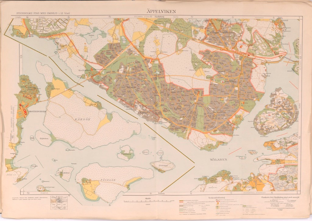 Kartblad ”Äppelviken” ur Stockholms stad med omnejd i 12 blad. Plankartan är upprättad 1917-1922 av H. Hellberg och A. E. Påhlman och reviderad 1933 under medverkan av Nils Hanzon och N.O. Olsson. Tryckår 1933. Exempel på platser och traktnamn som finns med på kartan: Drottningholm, Södra Ängby, Nockeby, Ålsten, Smedslätten, Äppelviken, Ulvsunda, Svartvik, Traneberg, Alvik, Stora Essingen, Ekensberg, Hägersten och Aspudden.